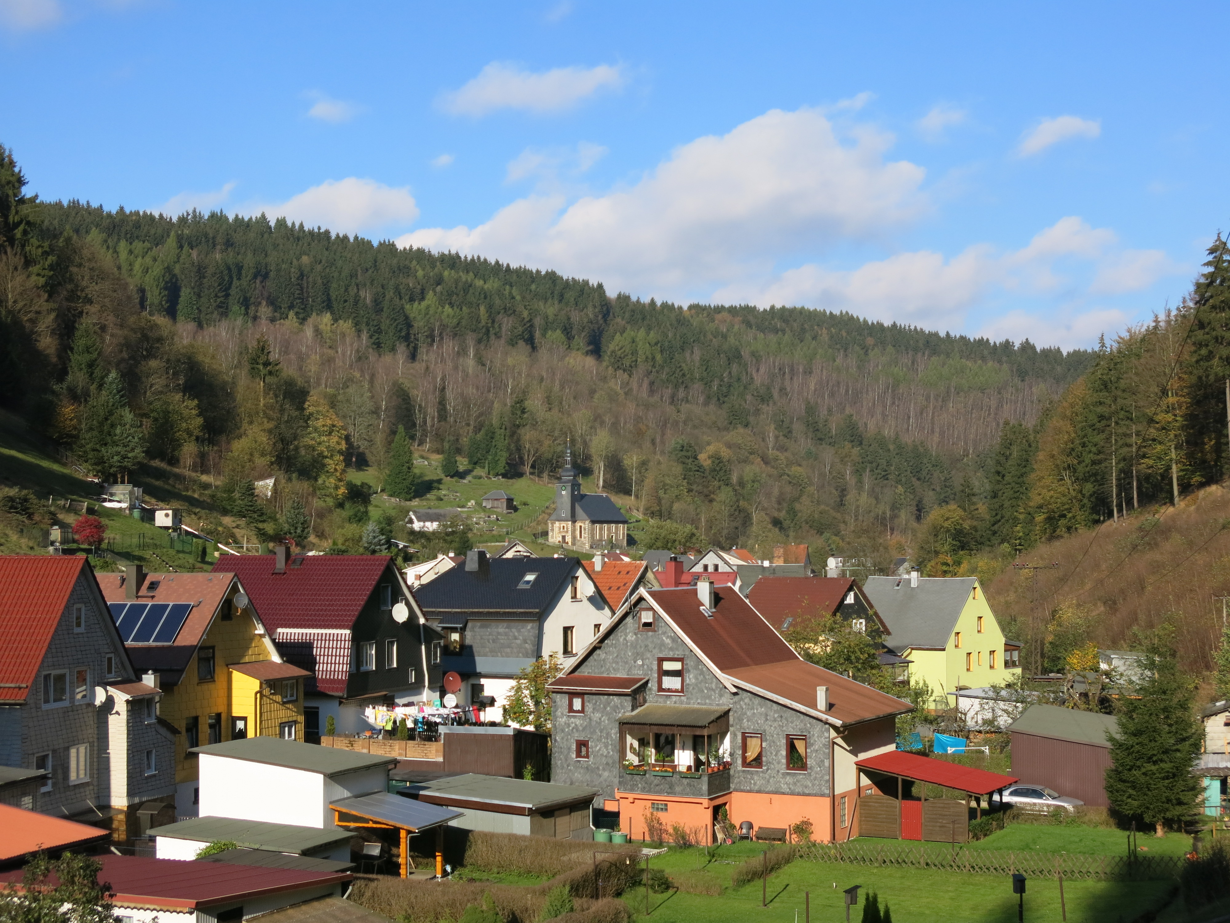 Blick zur Kirche